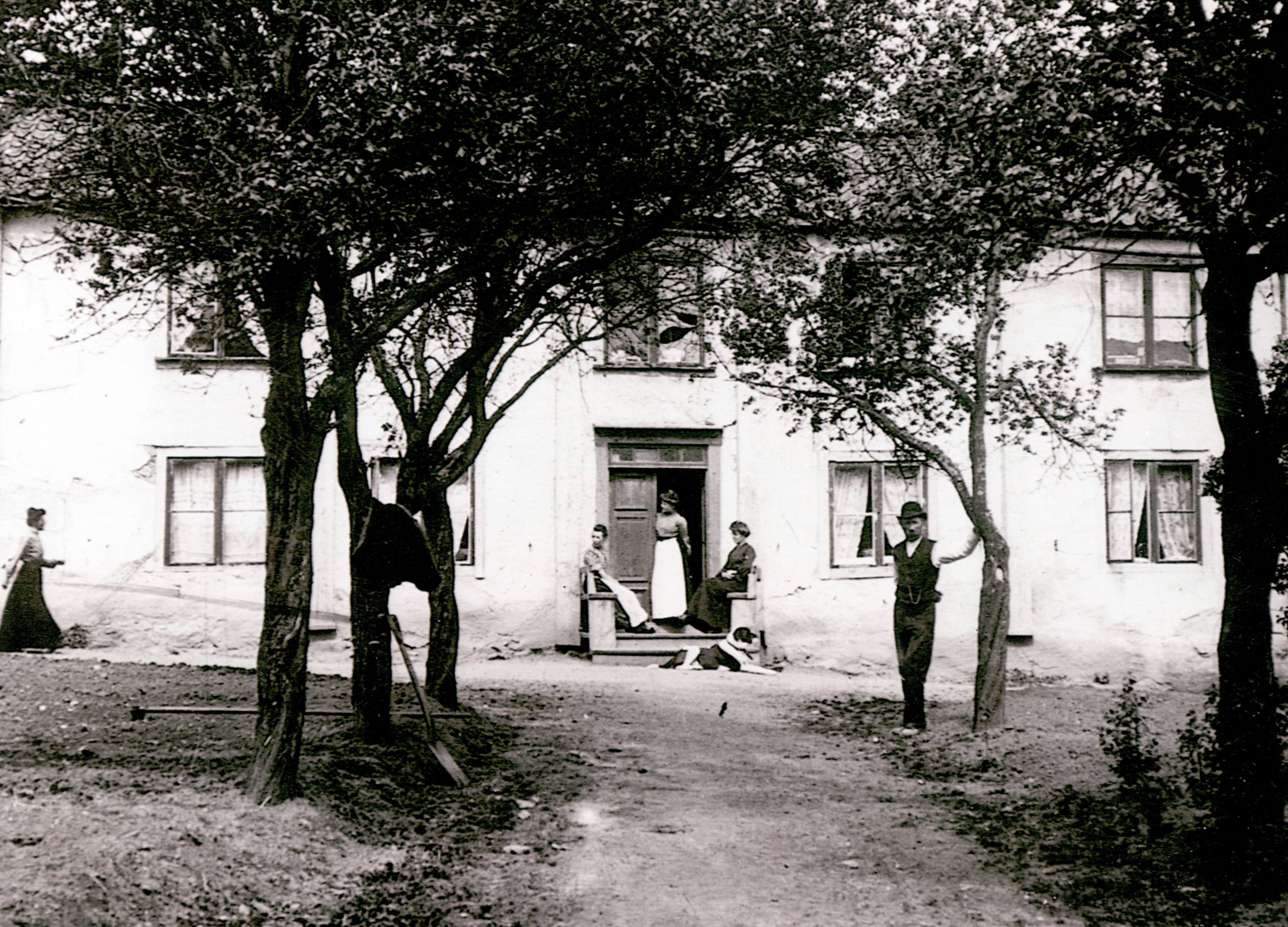 Övre Dammtorp 1906, okänd fotograf